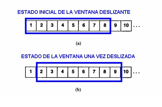 grafico sobre el funcionamiento de la ventana deslizante